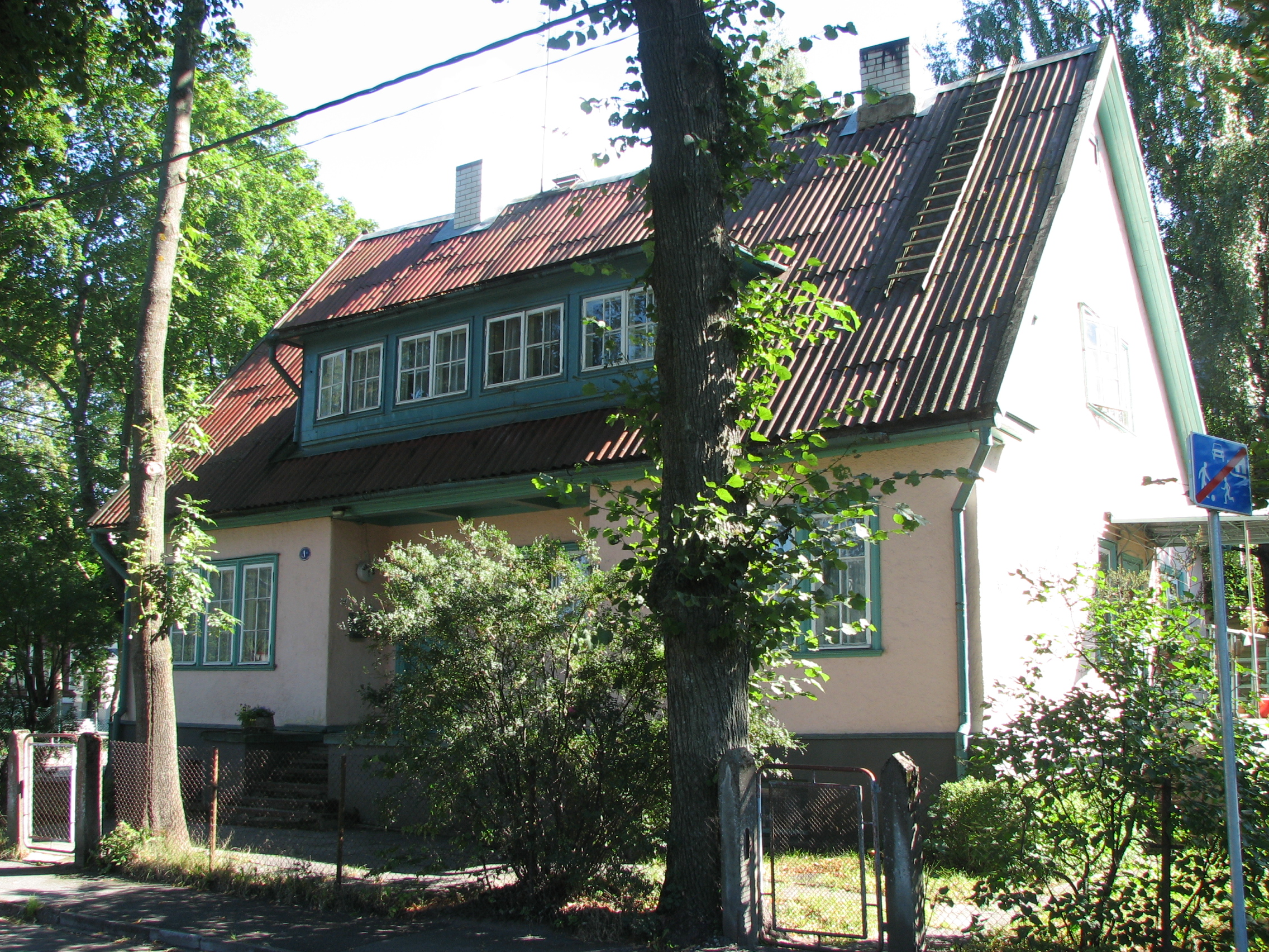 Vaikne tänav 1/Magasini tänav 28